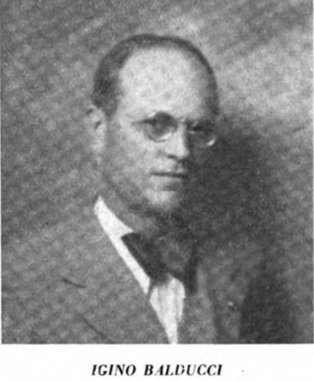 Igino Balducci, poeta italiano